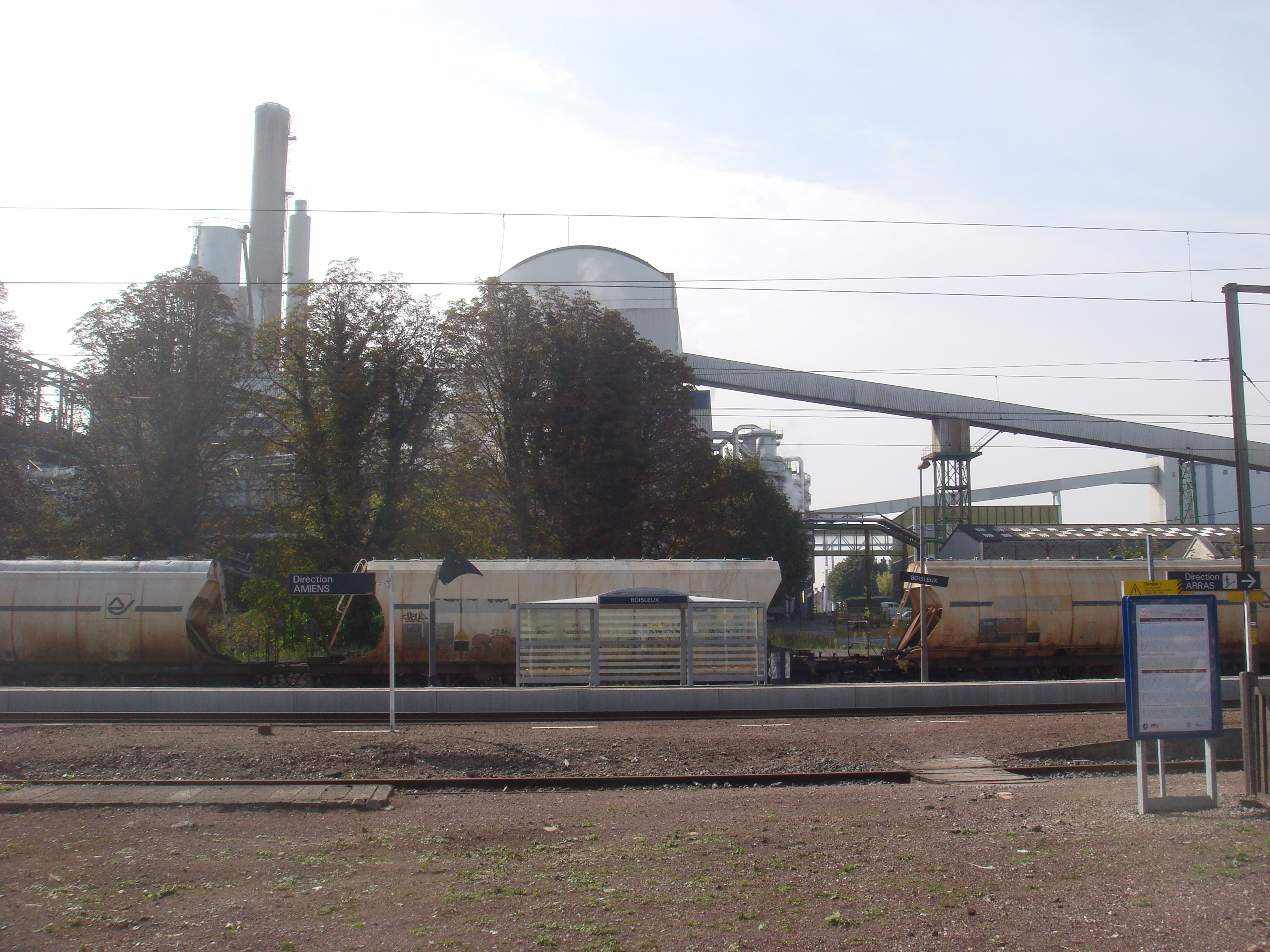 Gare de Boisleux, Pas de Calais, France